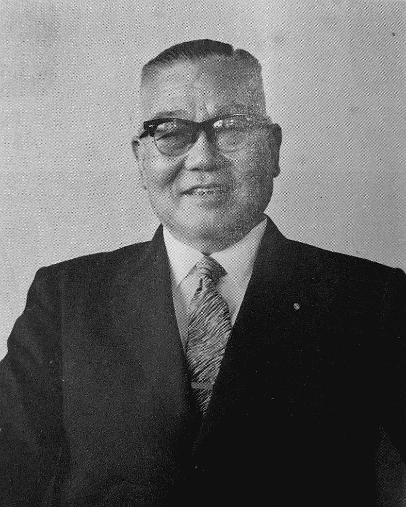 宮沢胤雄